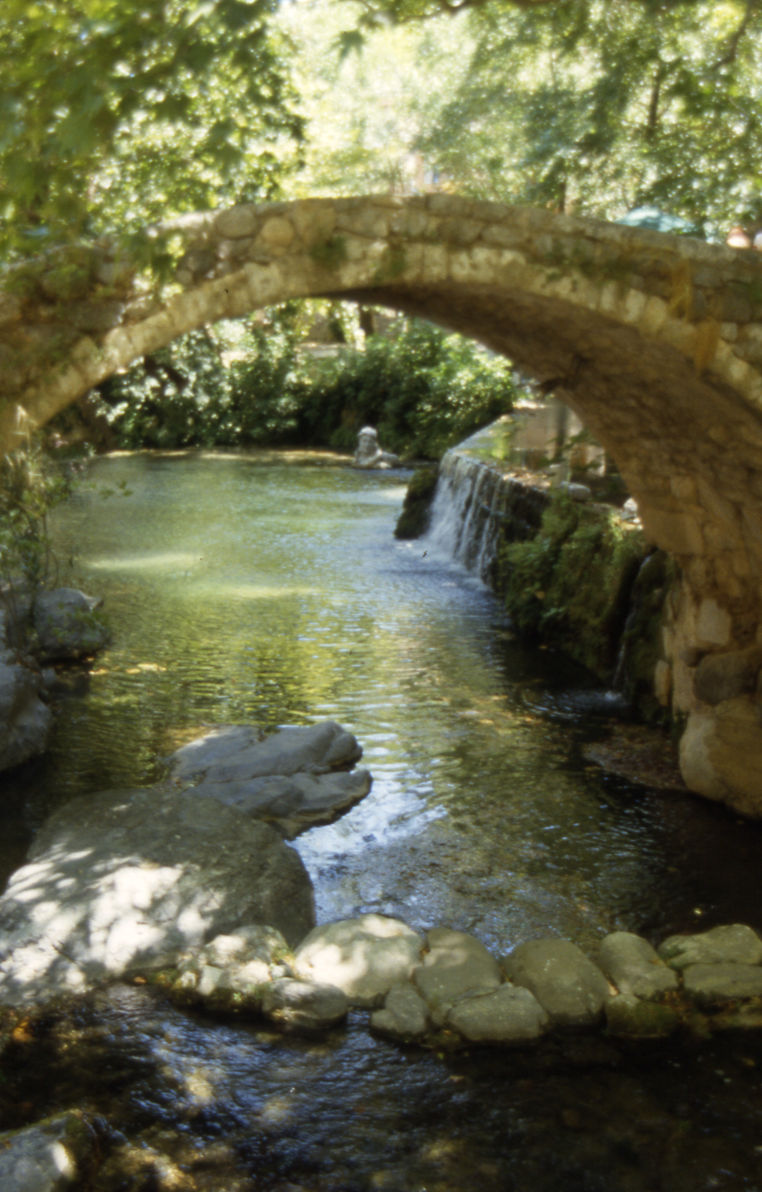 Brücke in Livadia